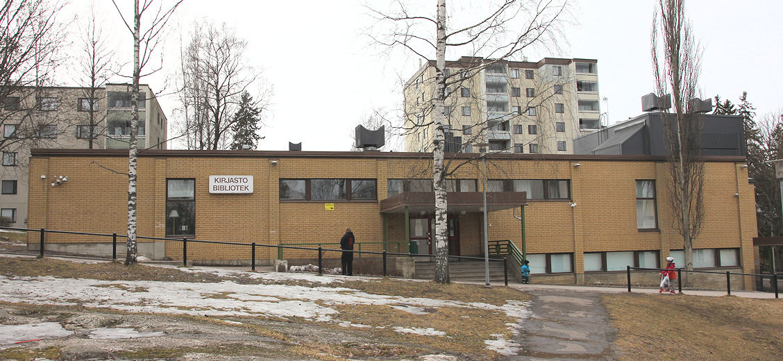 Hakunilan kirjasto Vantaalla. Samassa rakennuksessa, kuvassa oikealla näkyvässä rakennuksen korkeammassa osassa toimii päiväkoti.